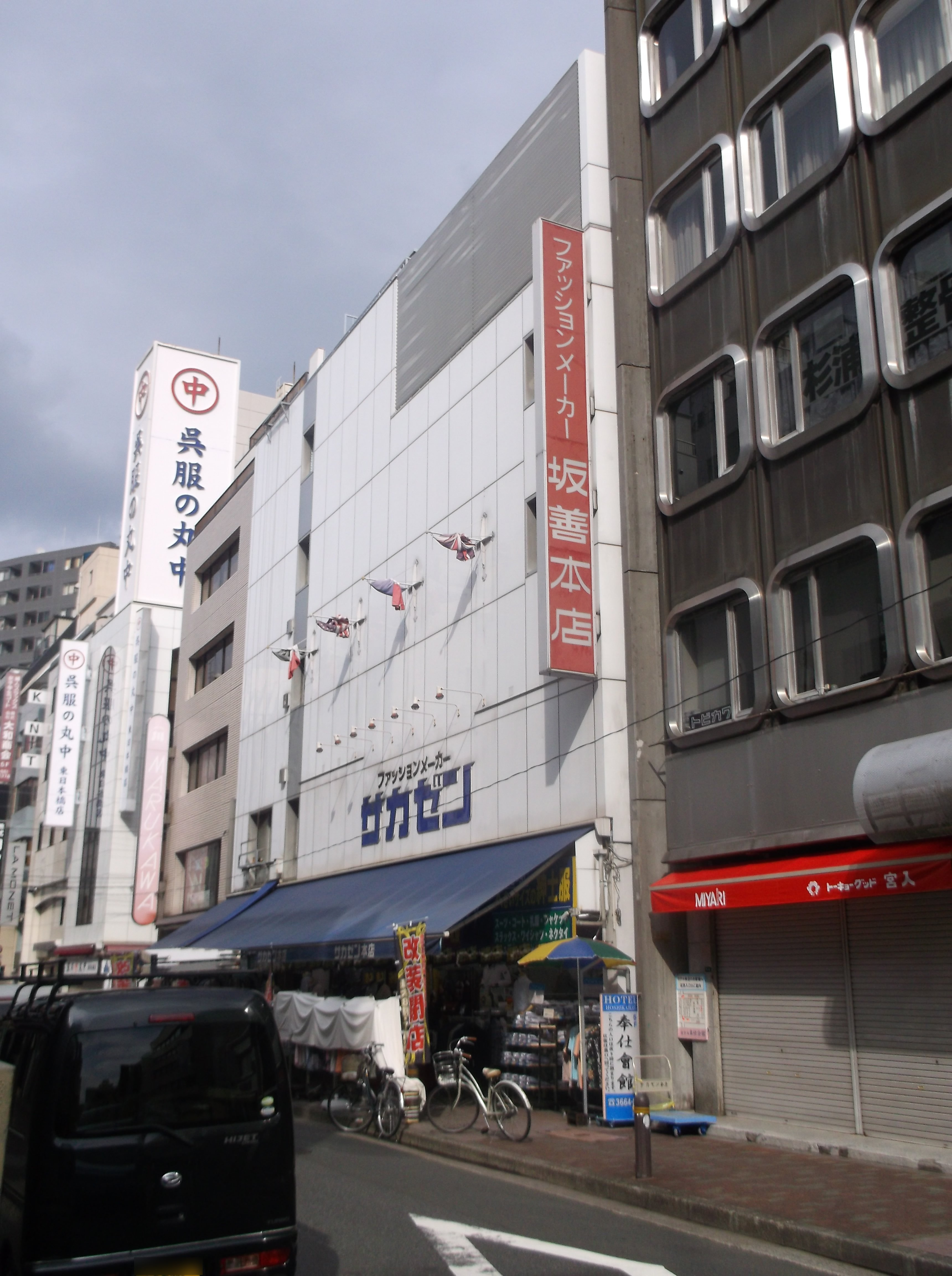 東京都中央区日本橋横山町にある「サカゼン本店」の写真。サイズの大きい男性衣料品など扱う店として知られる。